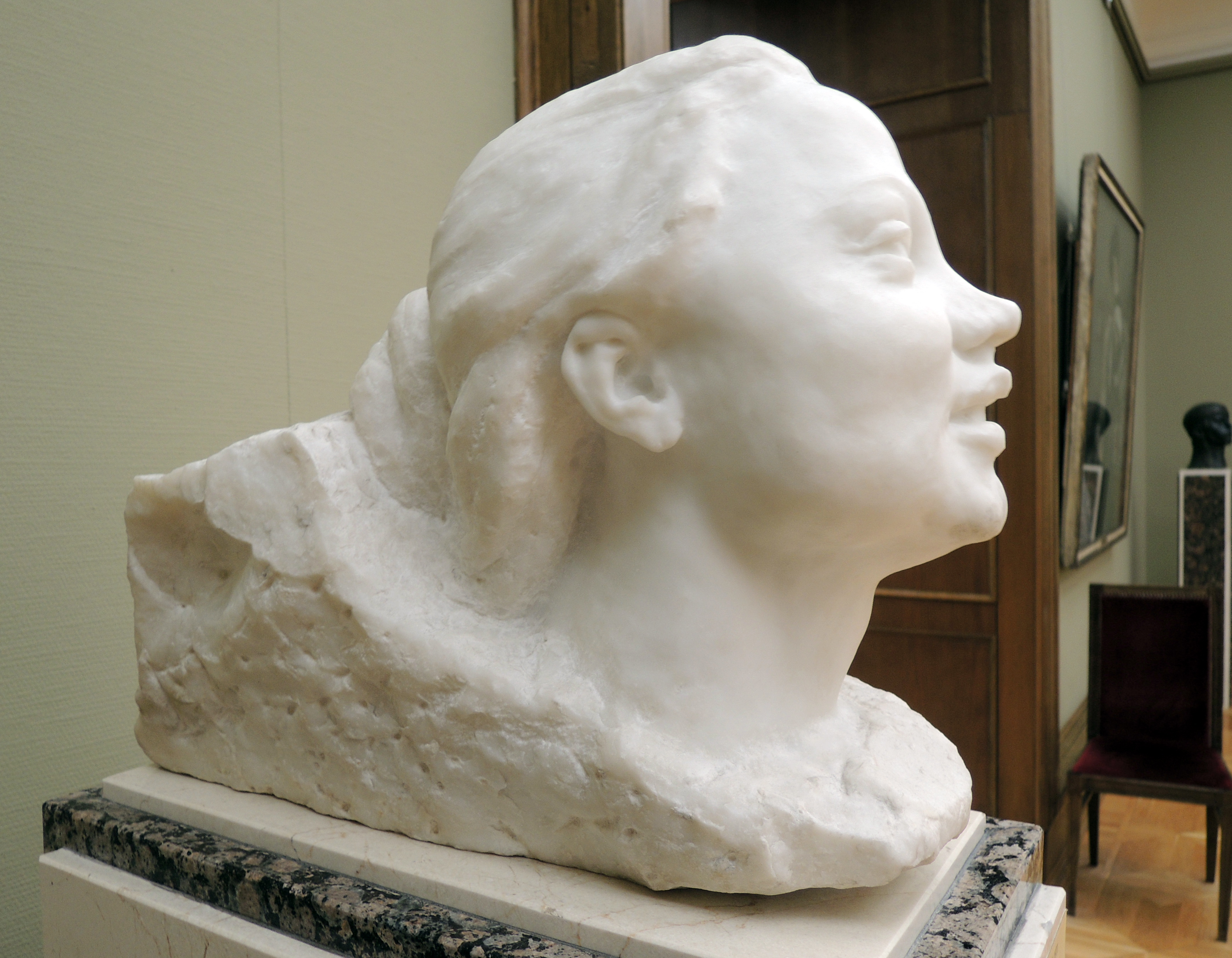 Коненков С.Т. (1874-1971). "Нике". 1906. ГТГ. Мрамор.